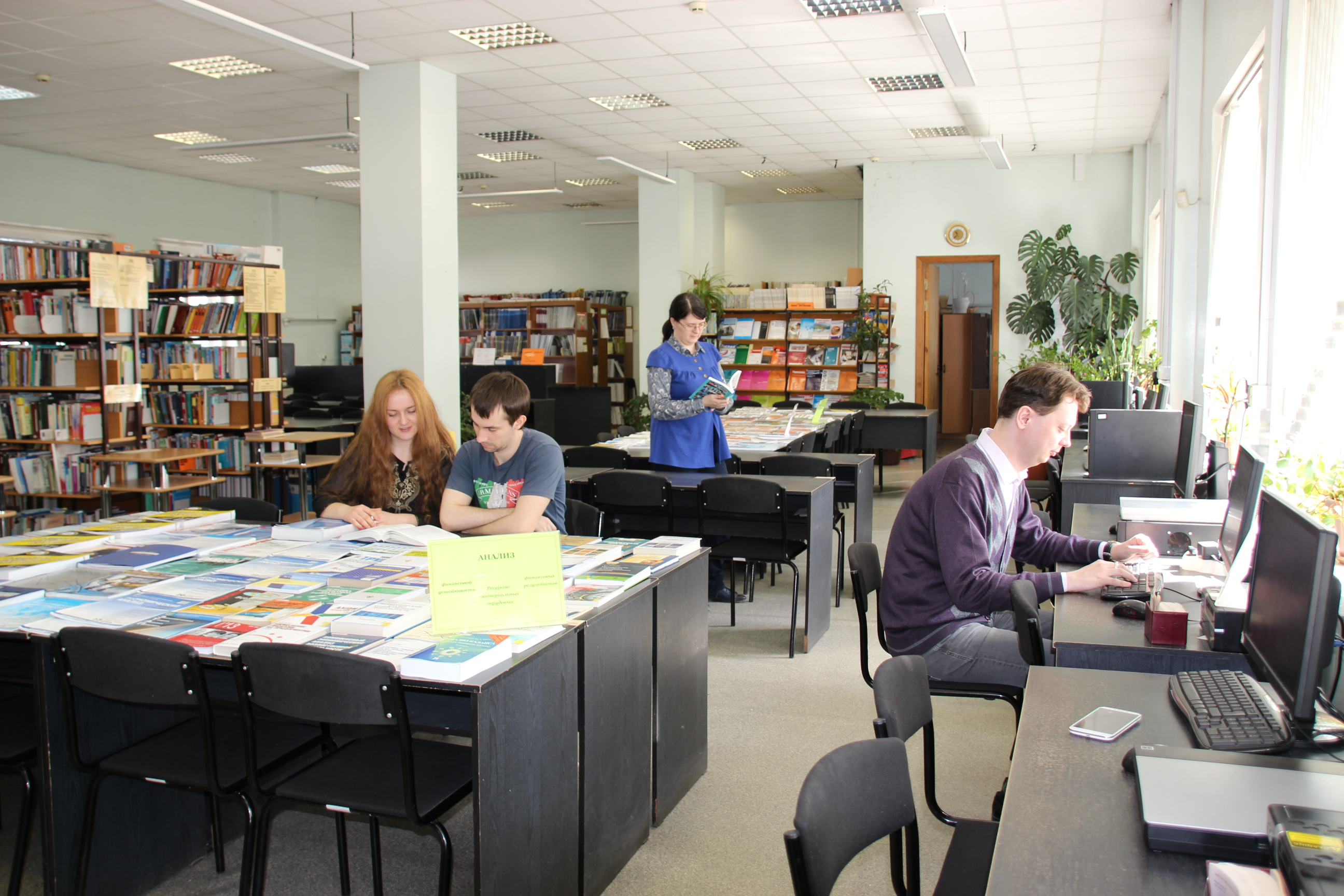 Библиотека в учебном корпусе № 3